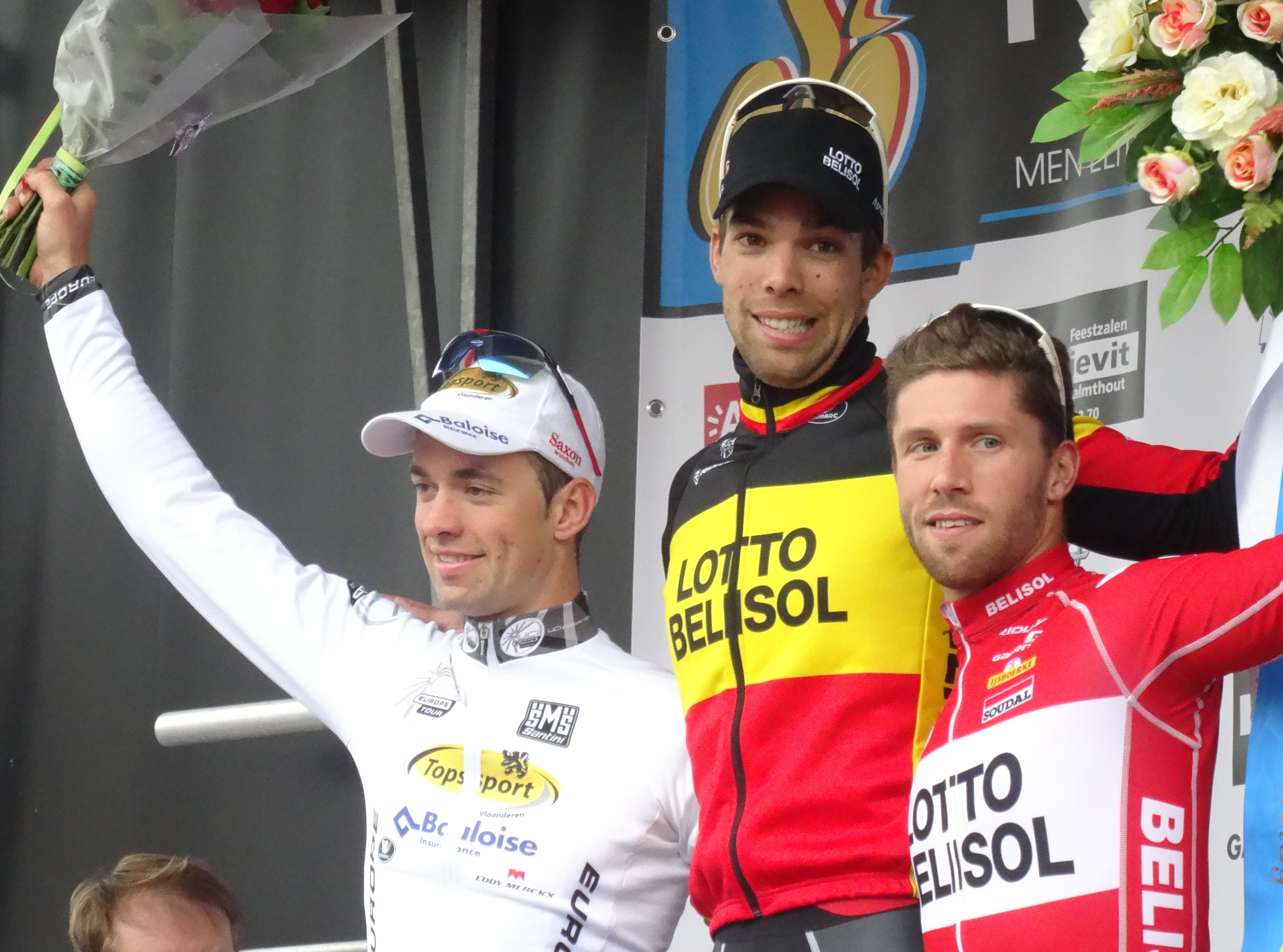 Reportage photographique réalisé le mardi 14 octobre à l'occasion du départ et de l'arrivée du Prix national de clôture 2014 à Putte (Woensdrecht, Pays-Bas) et Putte-Kapellen (Kapellen, Belgique).